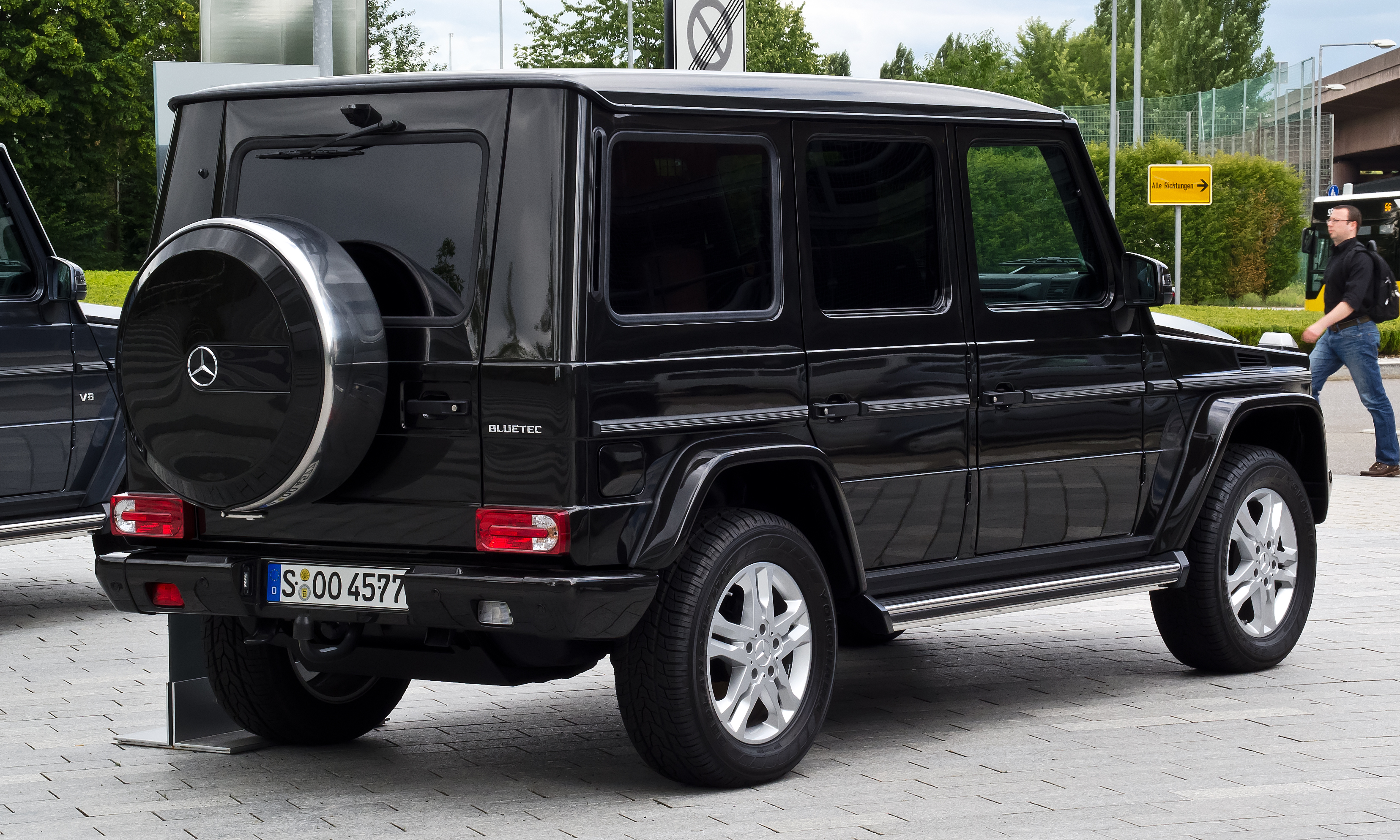 Mercedes-Benz G 350 BlueTEC (W 463, 3. Facelift)